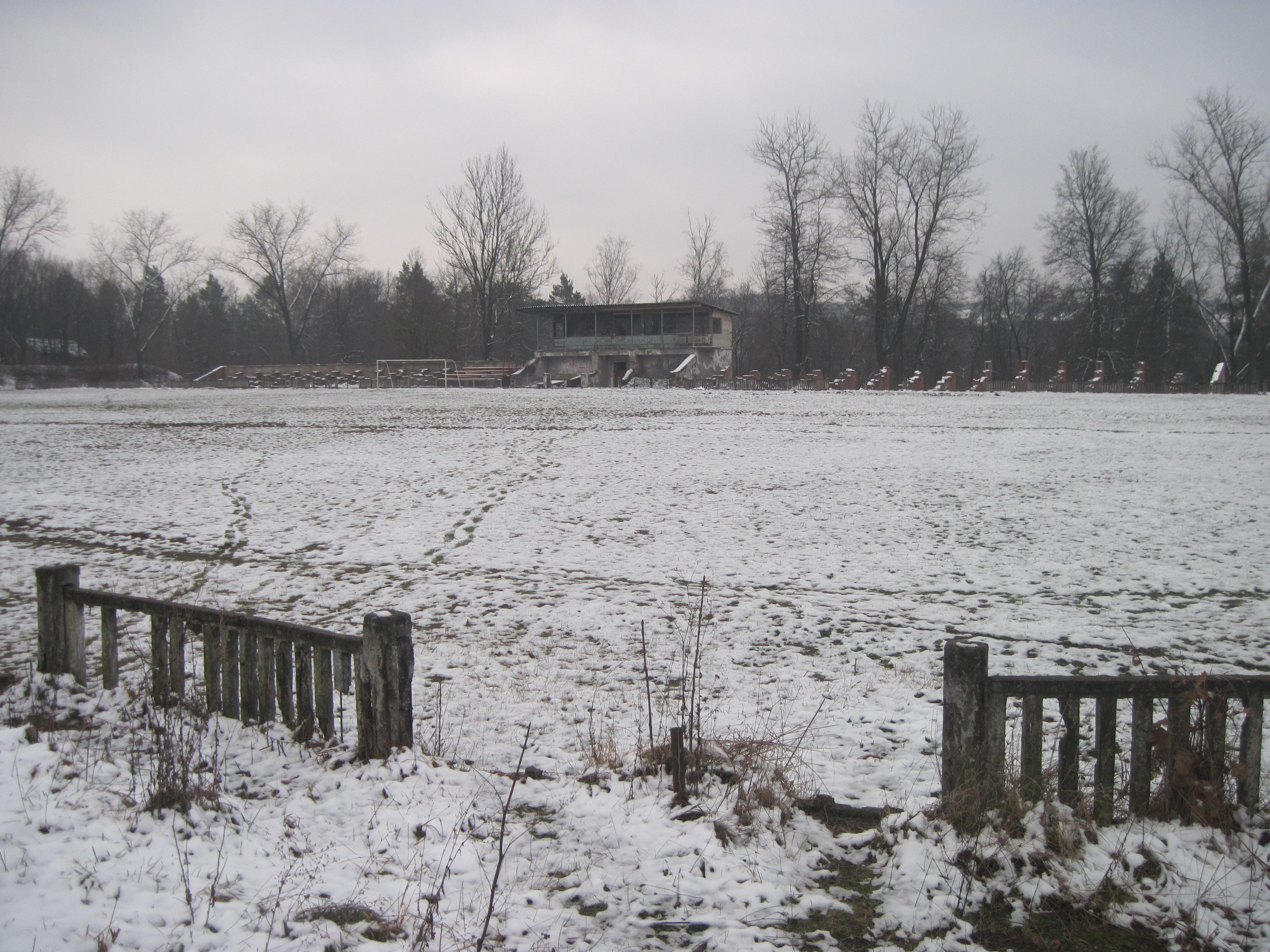 Старий стадіон Колос, Бучач, 2104